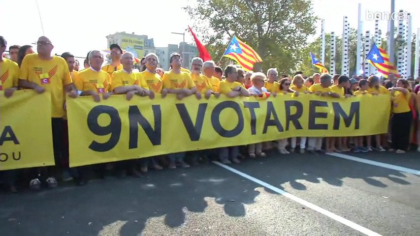 La ciutat s'ha omplert de gom a gom per la Via Catalana, i la gran participació ha estat la constant en tots els actes celebrats. El concert de 300 violoncels celebrat a la plaça Comercial, la Diada Castellera o la Festa de la Llibertat són exemple de l'aire festiu amb què els ciutadans han volgut celebrar aquest Onze de Setembre. Més informació